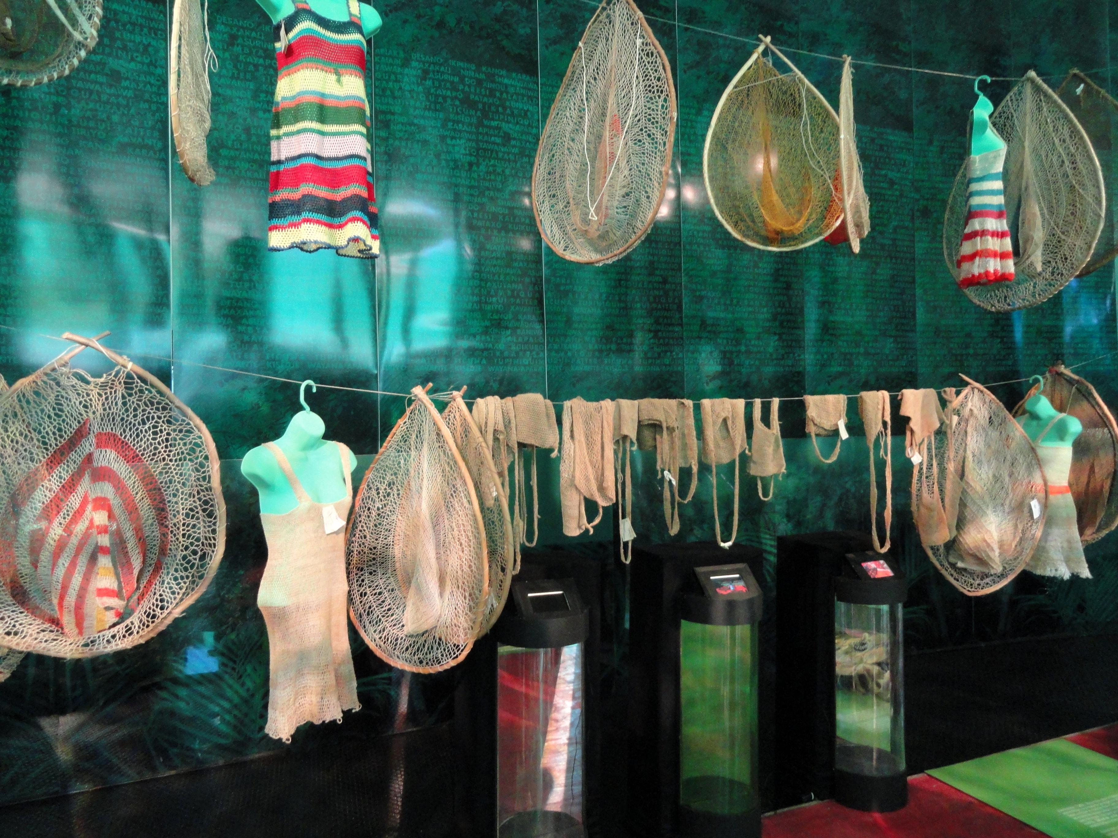 Exhibit in the Memorial dos Povos Indígenas, Brasília, Brazil.